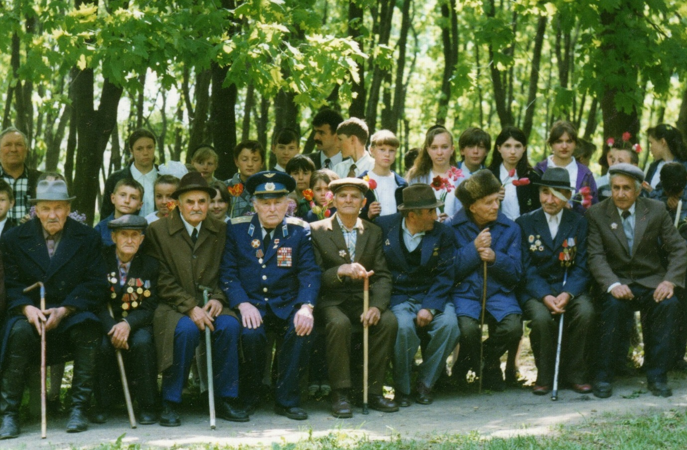 Ветерани села Юрченкове Чугуївського району. Зліва направо: Корнейко Михайло Гнатович, Бражник Андрій Петрович, Місюра Олексій Денисович (колишній директор Юрченківської школи з 01.09.1964 по 01.07.1984), Білокінь Кузьма Филимонович (Герой Радянського Союзу), Чоломбитько Василь Савич, Чоломбитько Григорій Іванович, Даниленко Максим Олексійович, Чоломбитько Іван Іванович, Курилко Леонід Якович.